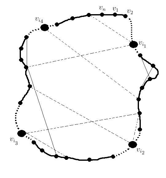 Hamilton-kör